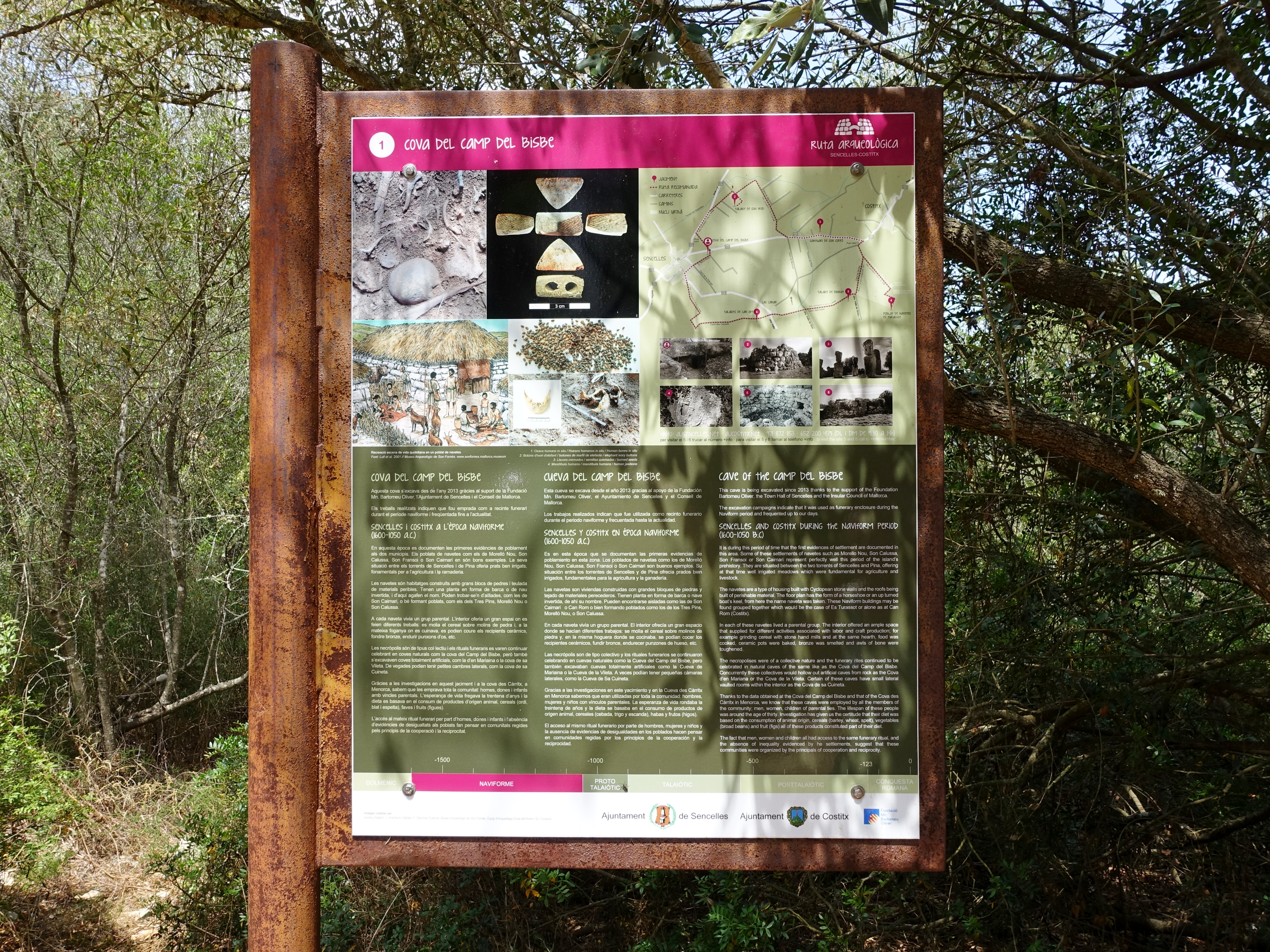 Hinweisschild an der Cova del Camp del Bisbe, Gemeinde Sencelles, Mallorca, Spanien